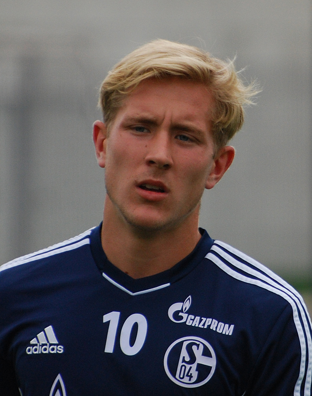 Lewis Holtby